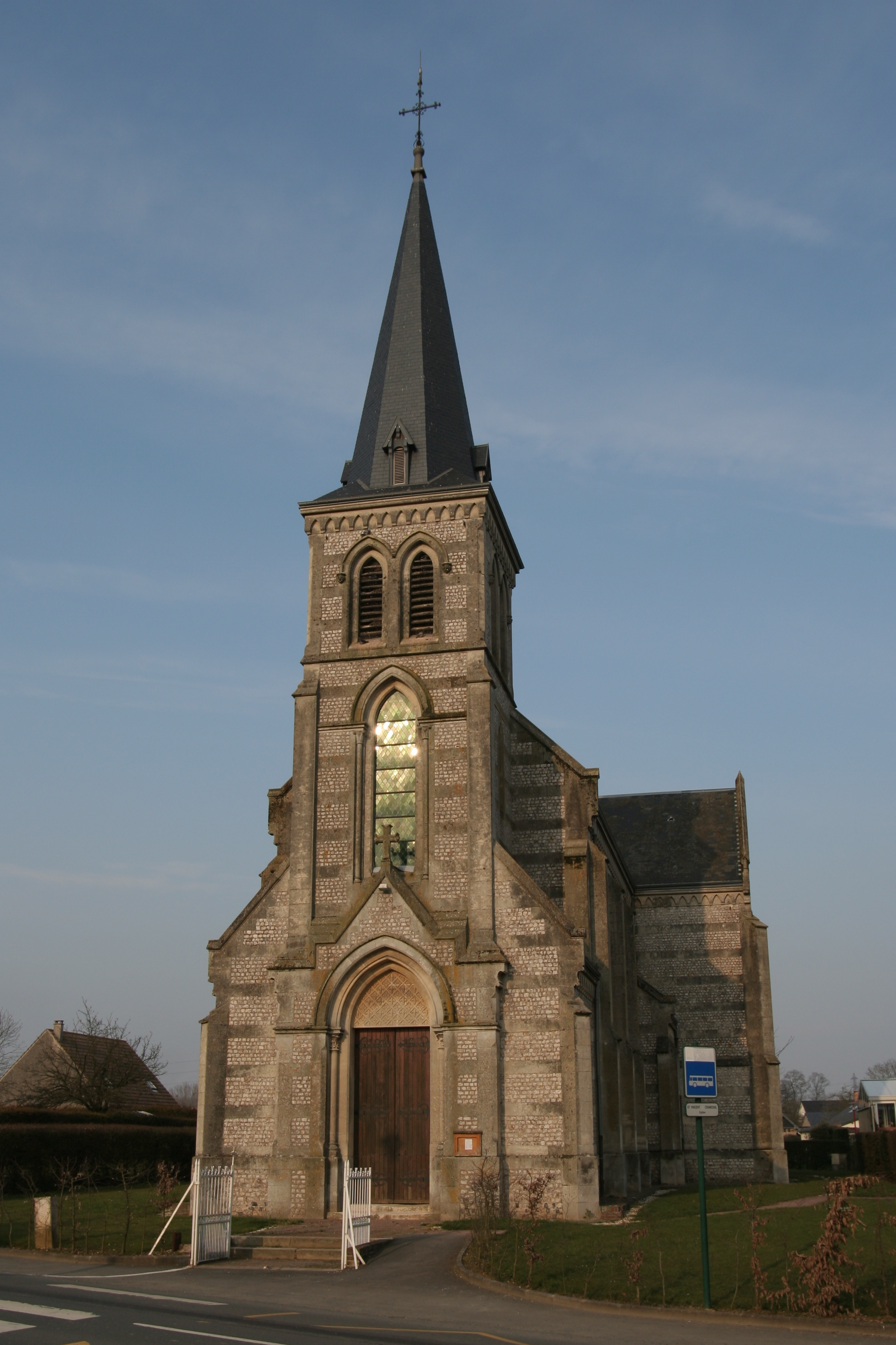 L'église Saint-Vincent de Saint-Vincent-Cramesnil.